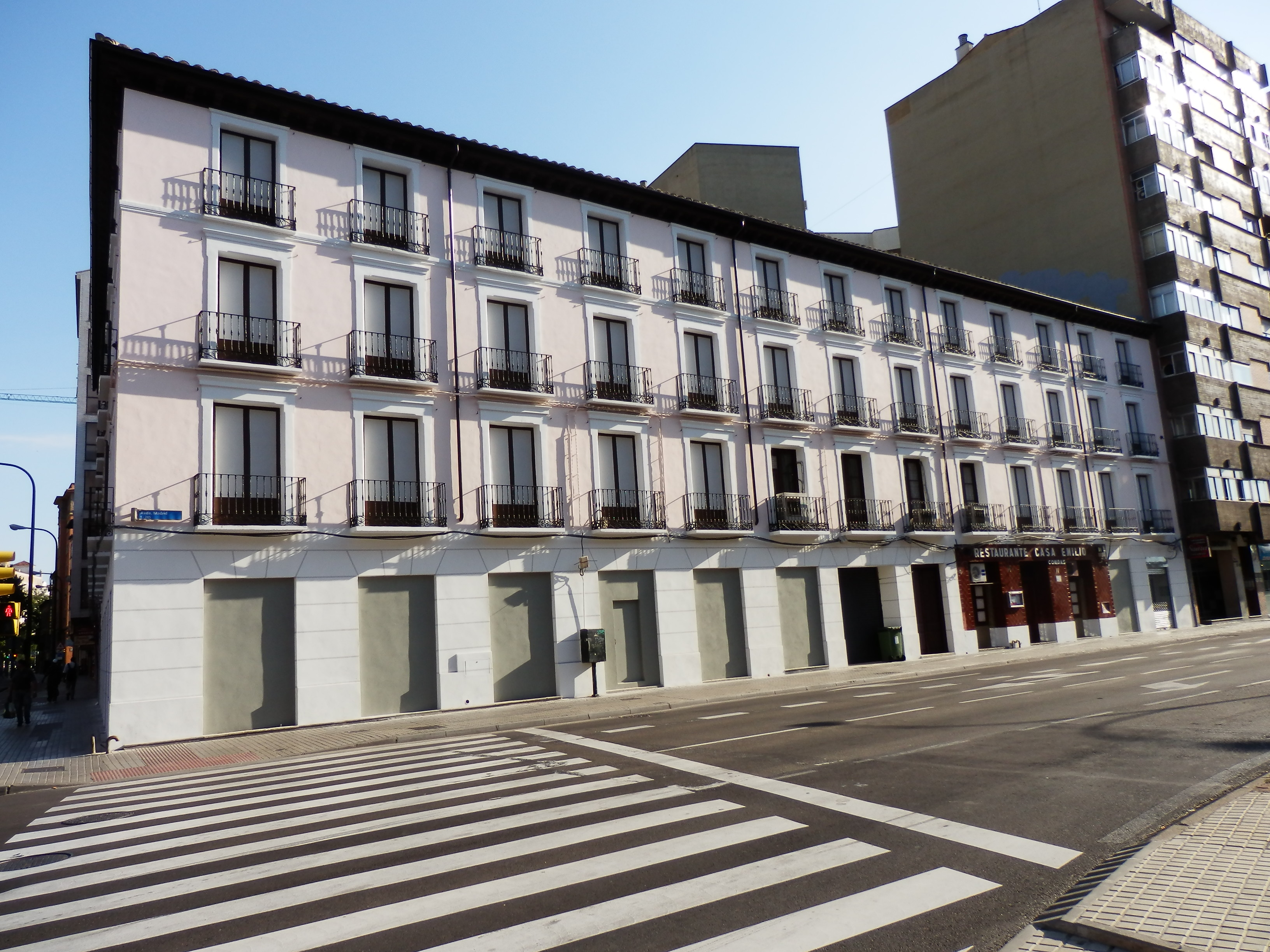 Restaurante Casa Emilio en Zaragoza